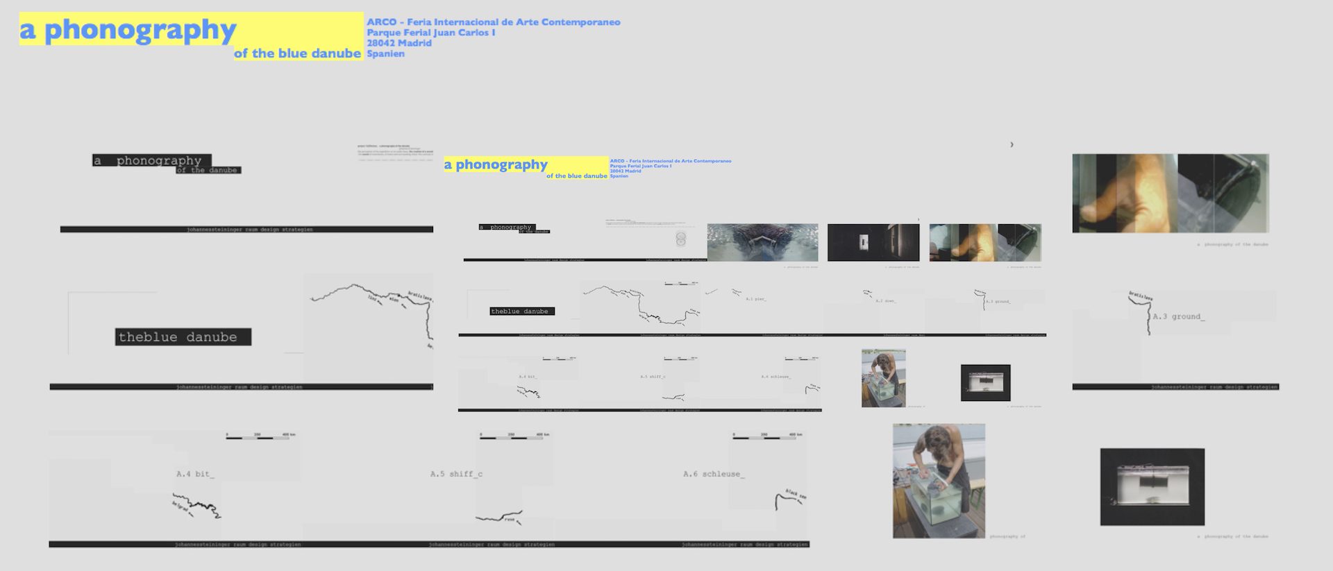 Europe Flagship on Tour UD. A. últimos diseños austríacos | Madrid